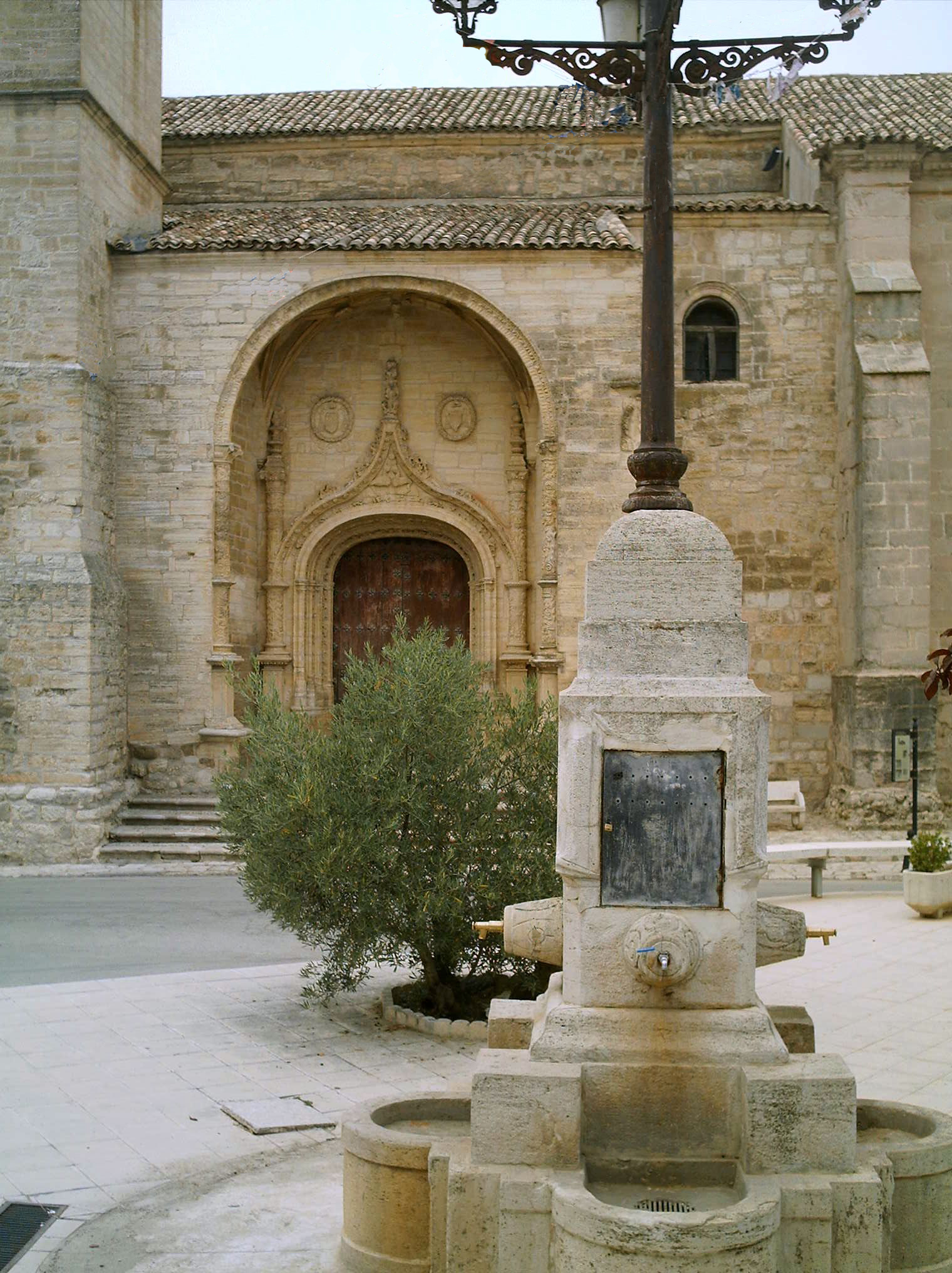 Puerta del Sur de la Iglesia de Carrascosa del Campo